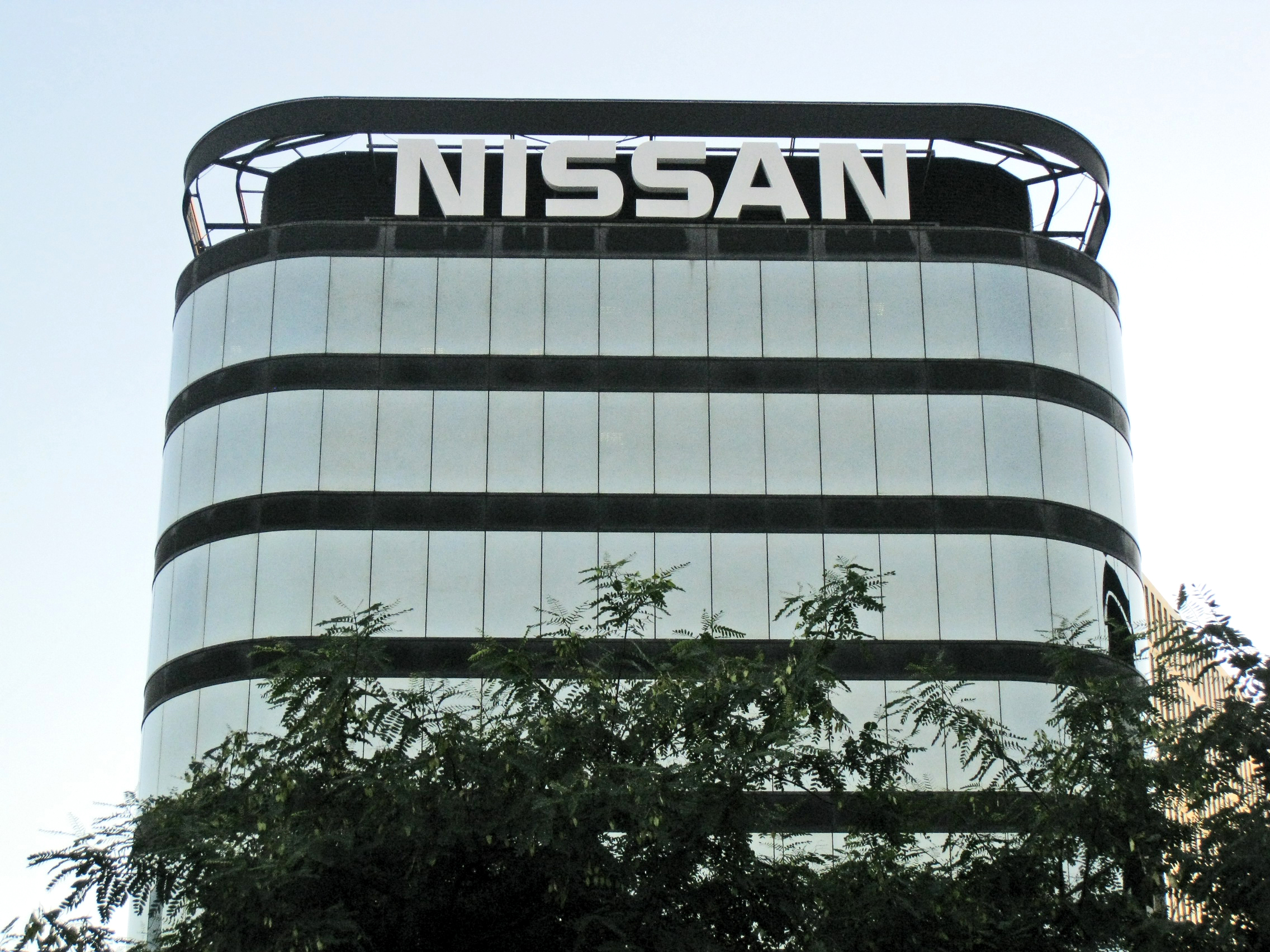 Torre Nissan, que acull les oficines centrals de l'empresa automobilística Nissan Motor España, a la plaça Cerdà de Barcelona.